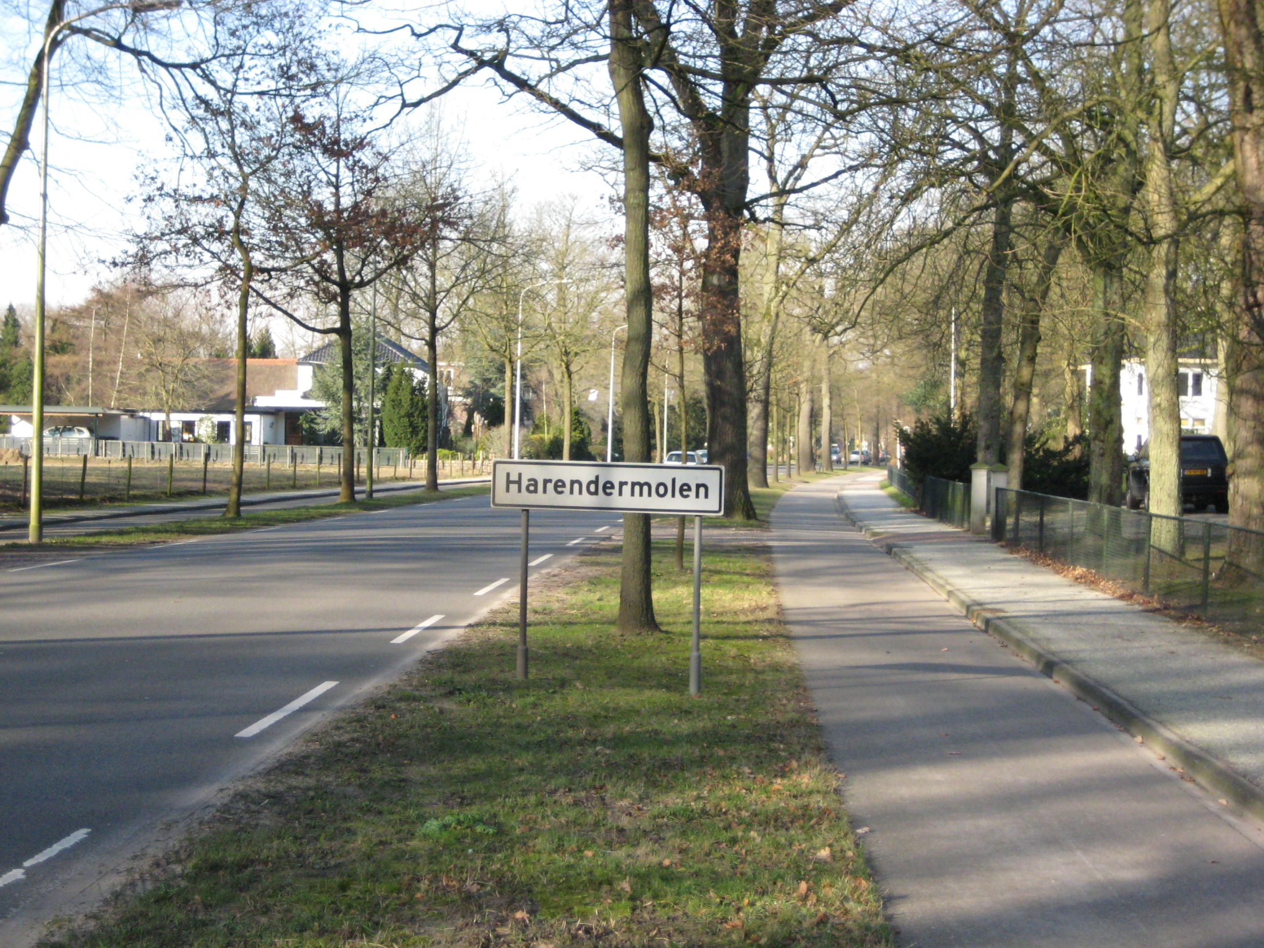 Harendermolen